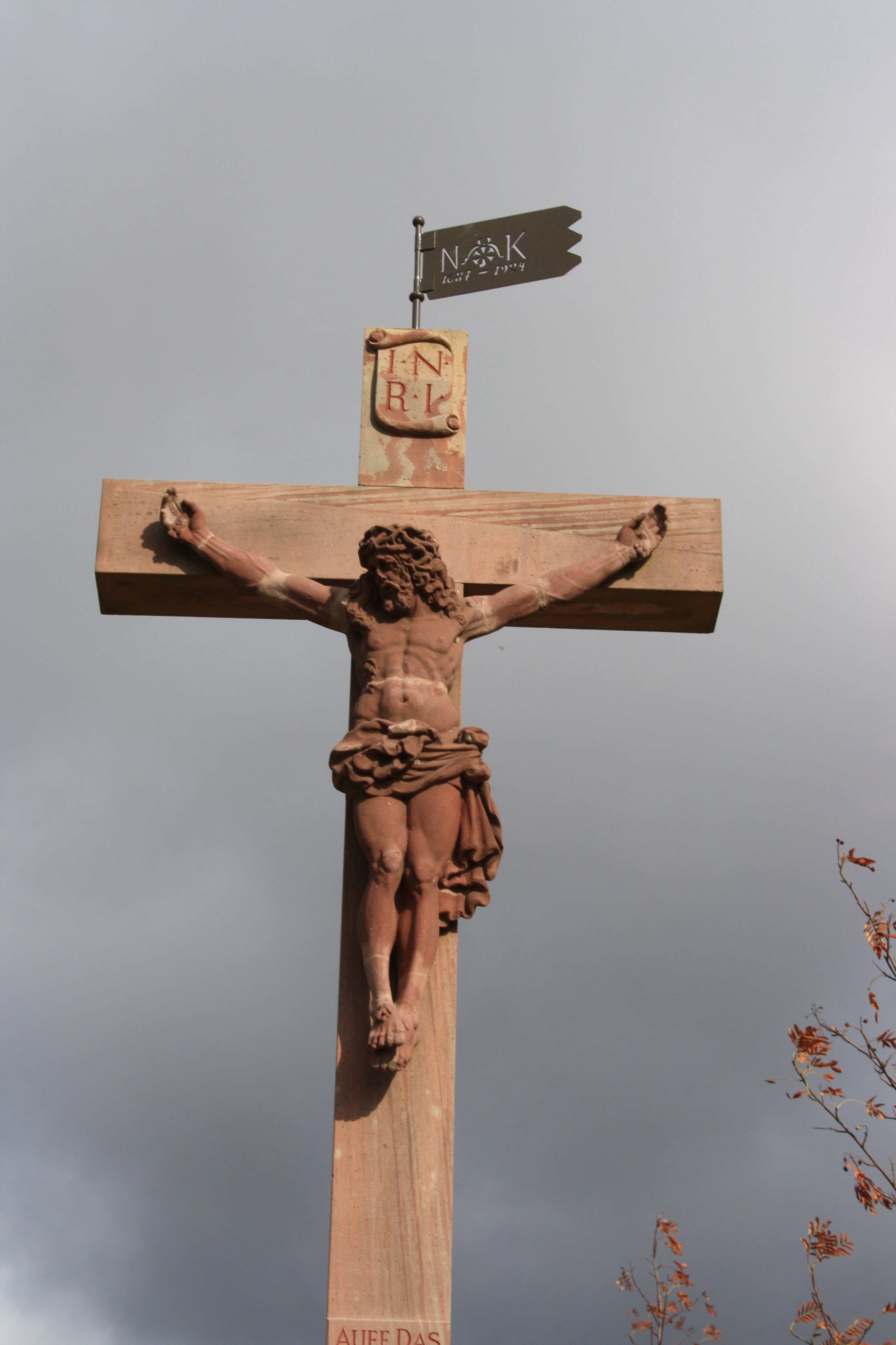 Wegkreuz an der Elisabethenstraße bei Mainz-Kastel